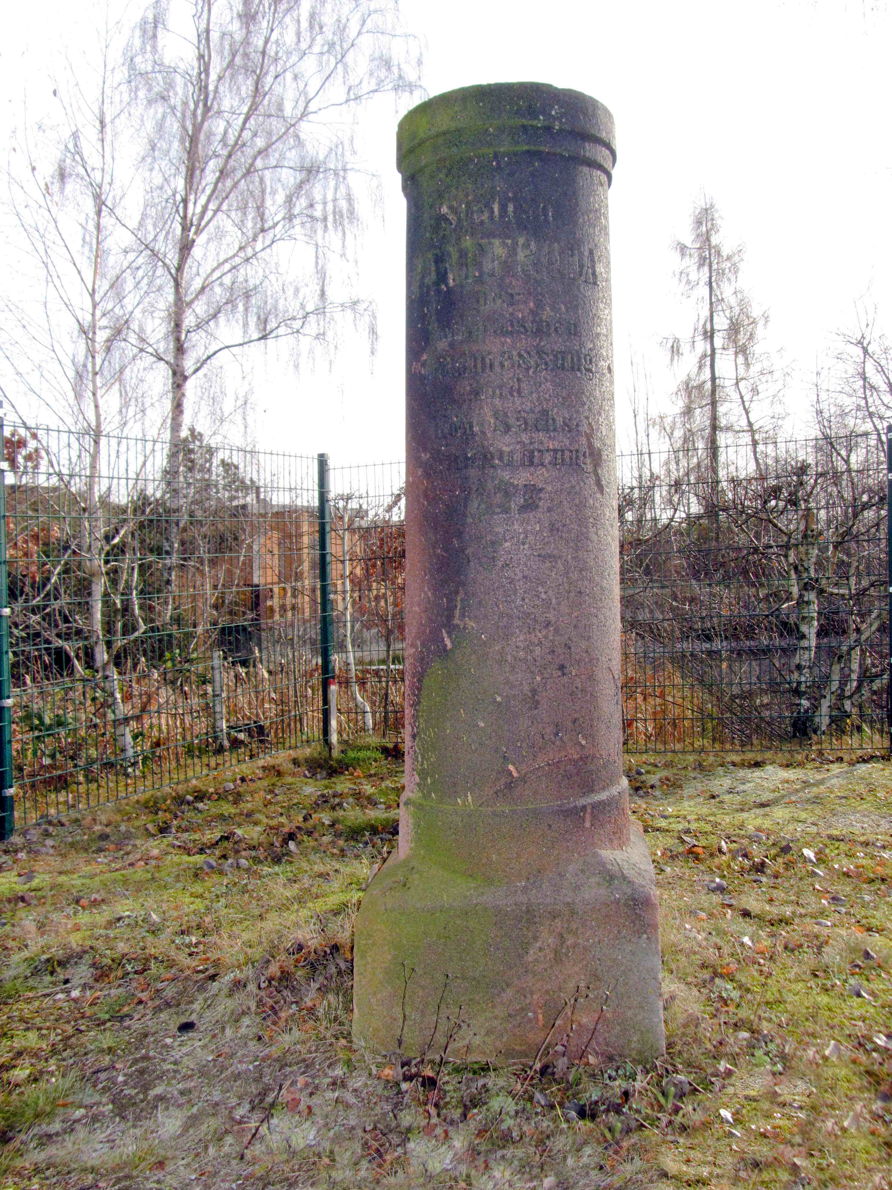 Königlich-Sächsische Triangulation Station 121 Pfaffroda Vermessungspunkt II. Ordnung